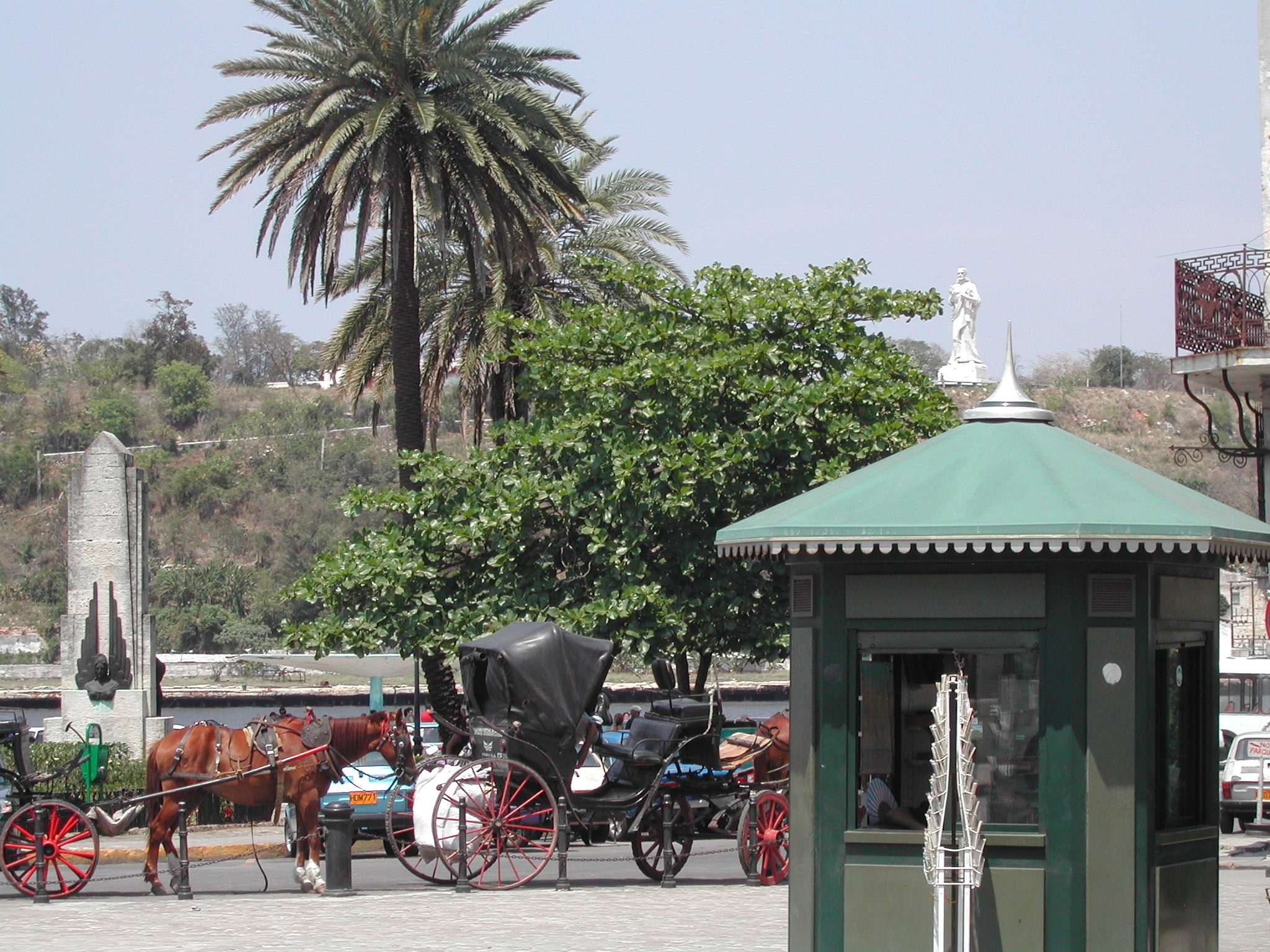 Plaza de Armas zu Havanna